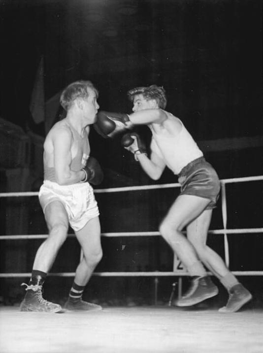 Hamalainen, Rospierski Zentralbild Cap Nen-Qu 5 Motive 21.12.1954 Boxkampf Polen-Finnland in Stalinograd (Polen) Am 6. Dezember 1954 wurden in Stalinograd Boxkämpfe zwischen polnischen und finnischen Boxern ausgetragen, die mit einem 8:2 Punktsieg für die polnischen Boxer endeten. Nach einem 6:4 über die französischen und einem 6:2 über die belgischen boxer, war dieses der dritte Sieg innerhalb von 10 Tagen. UBz: Boxkampf der Federgewichtsklasse.- Olympiasieger Hamalainen aus Finnland (links) besiegte den Polen Rospierski.